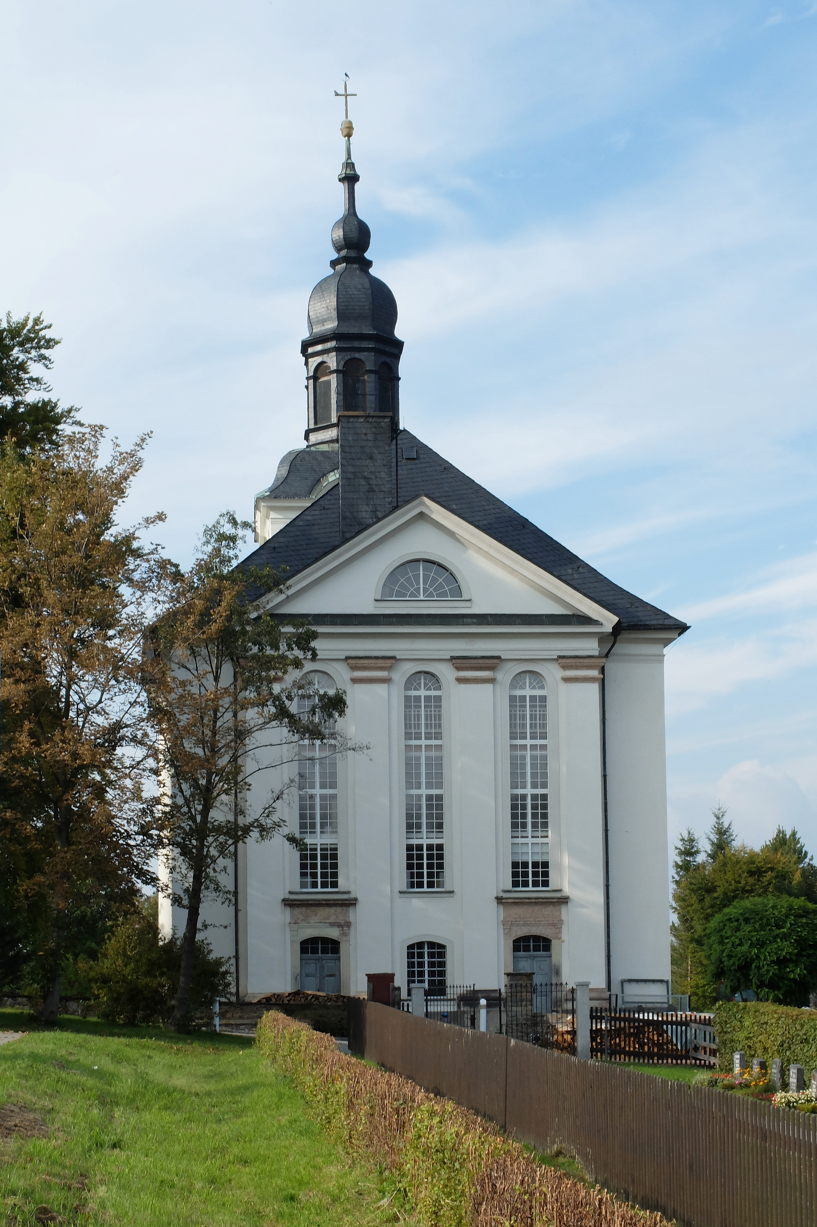 Kirche in Mildenau, Erzgebirgskreis (Sachsen) 50.5902761,13.067361